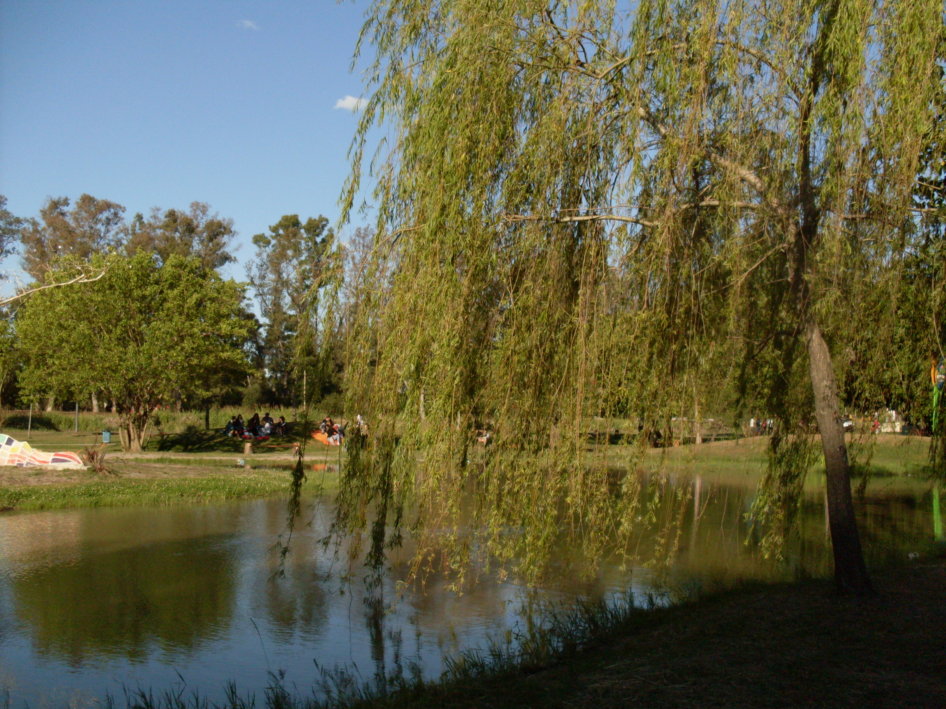 Parque papa Francisco de la localidad de Ing. Maschwitz en el Partido Escobar, provincia de Buenos Aires, Argentina. Este parque anteriormente era llamado El Dorado.